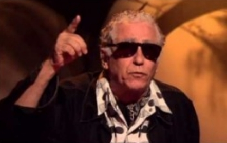 O diretor de cinema brasileiro Neville de Almeida.